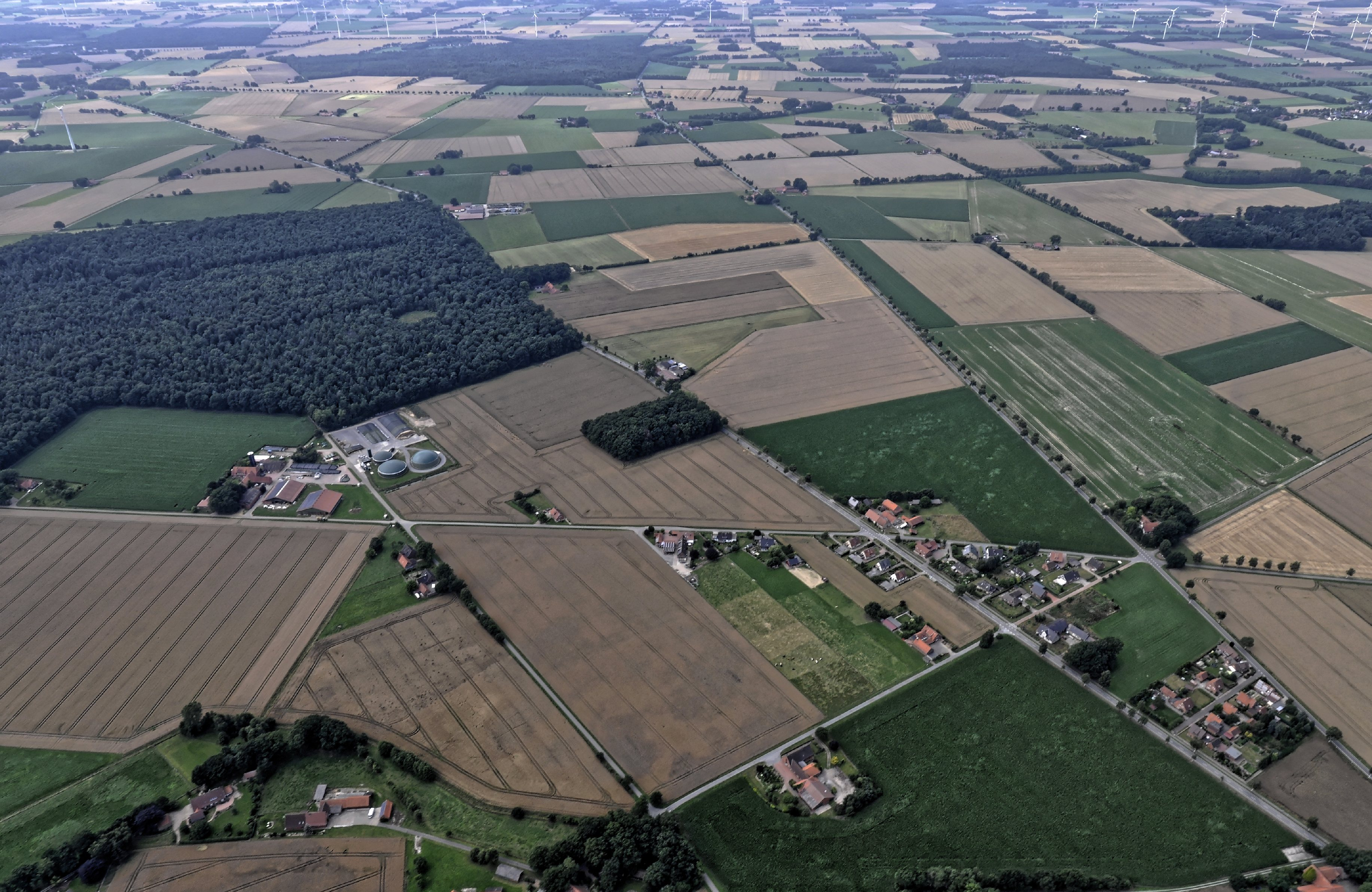 Bilder vom Flug Nordholz-Hammelburg 2015: Teilansicht von Affinghausen.